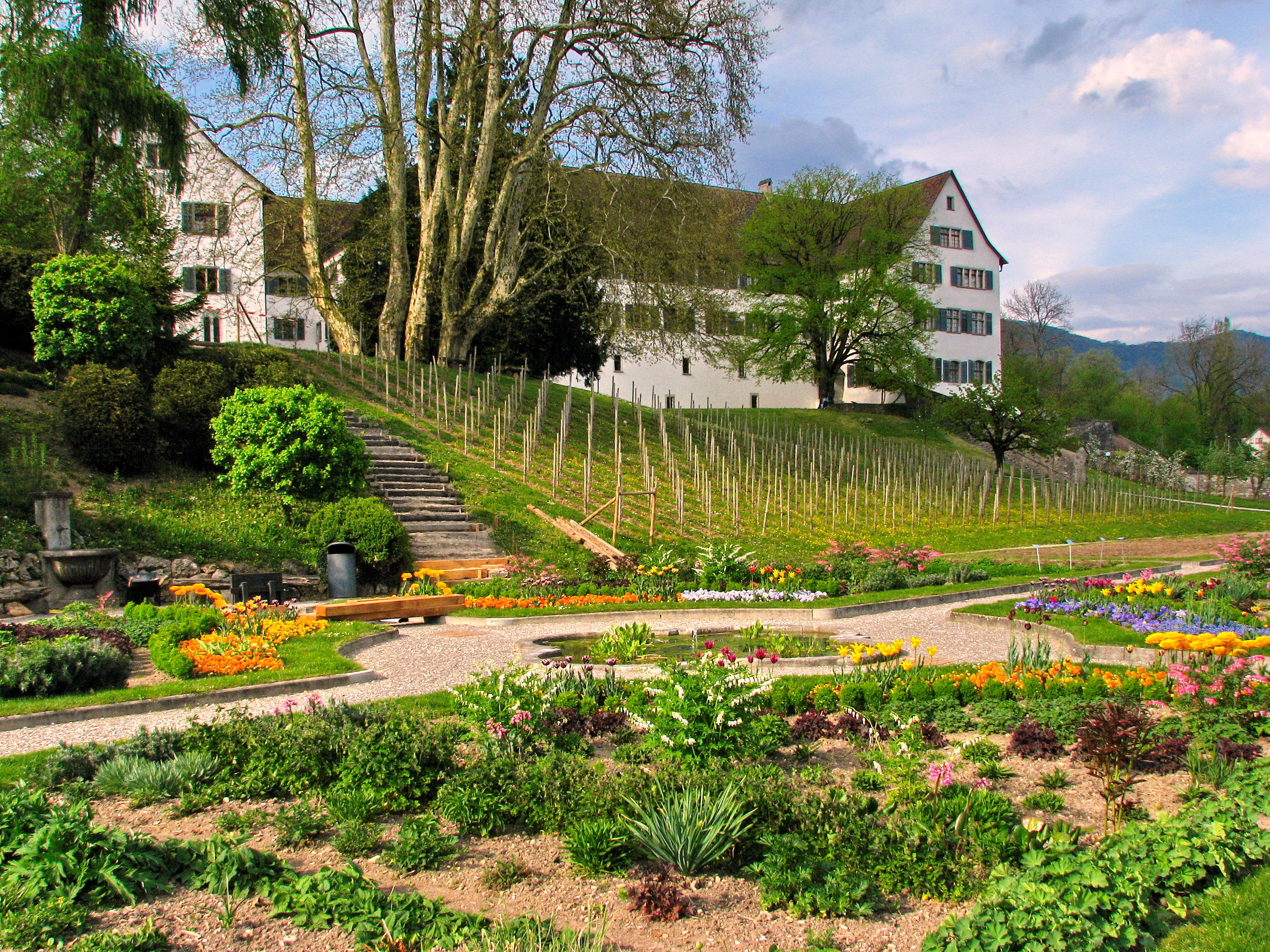 Kloster Wettingen in Wettingen